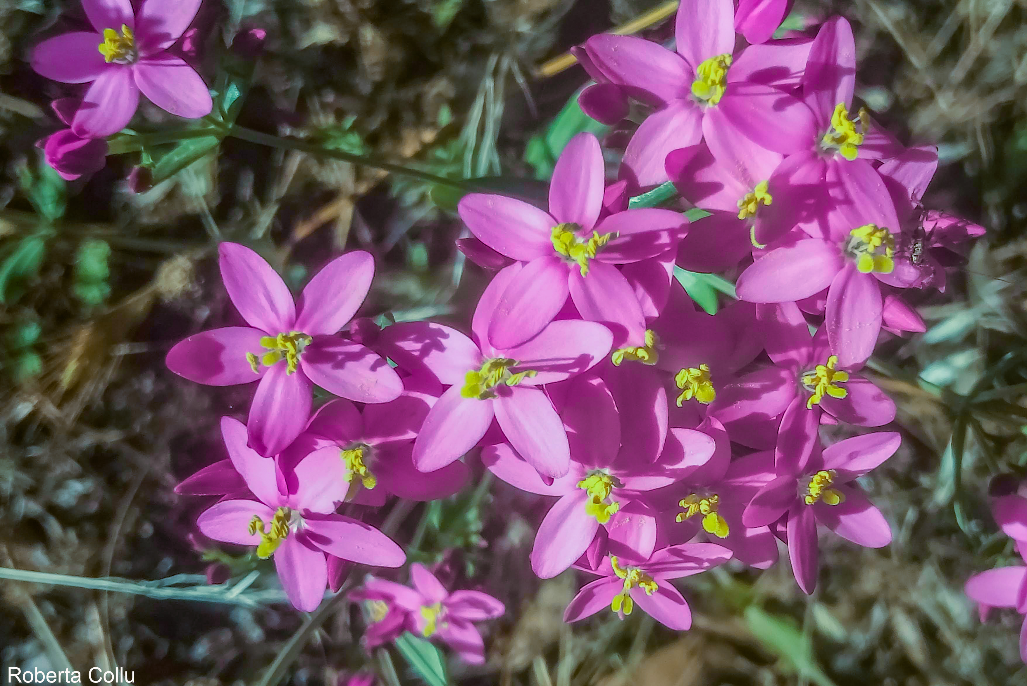 Centaurium erythraea Rafn-Cacciafebbre- Pianta spontanea utilizzata in passato per la cura di febbri quali la malaria